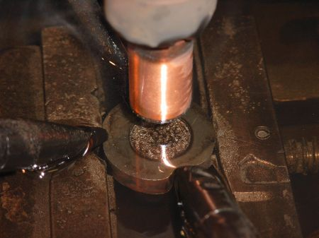 Elektroerozijska obdelava.